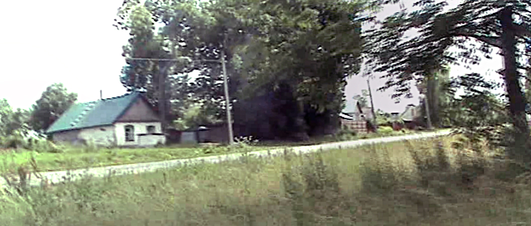 Посёлок Скорятино Верховского района Орловской области.